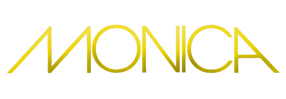 Logotyp för den amerikanska R&B-sångerskan Monica